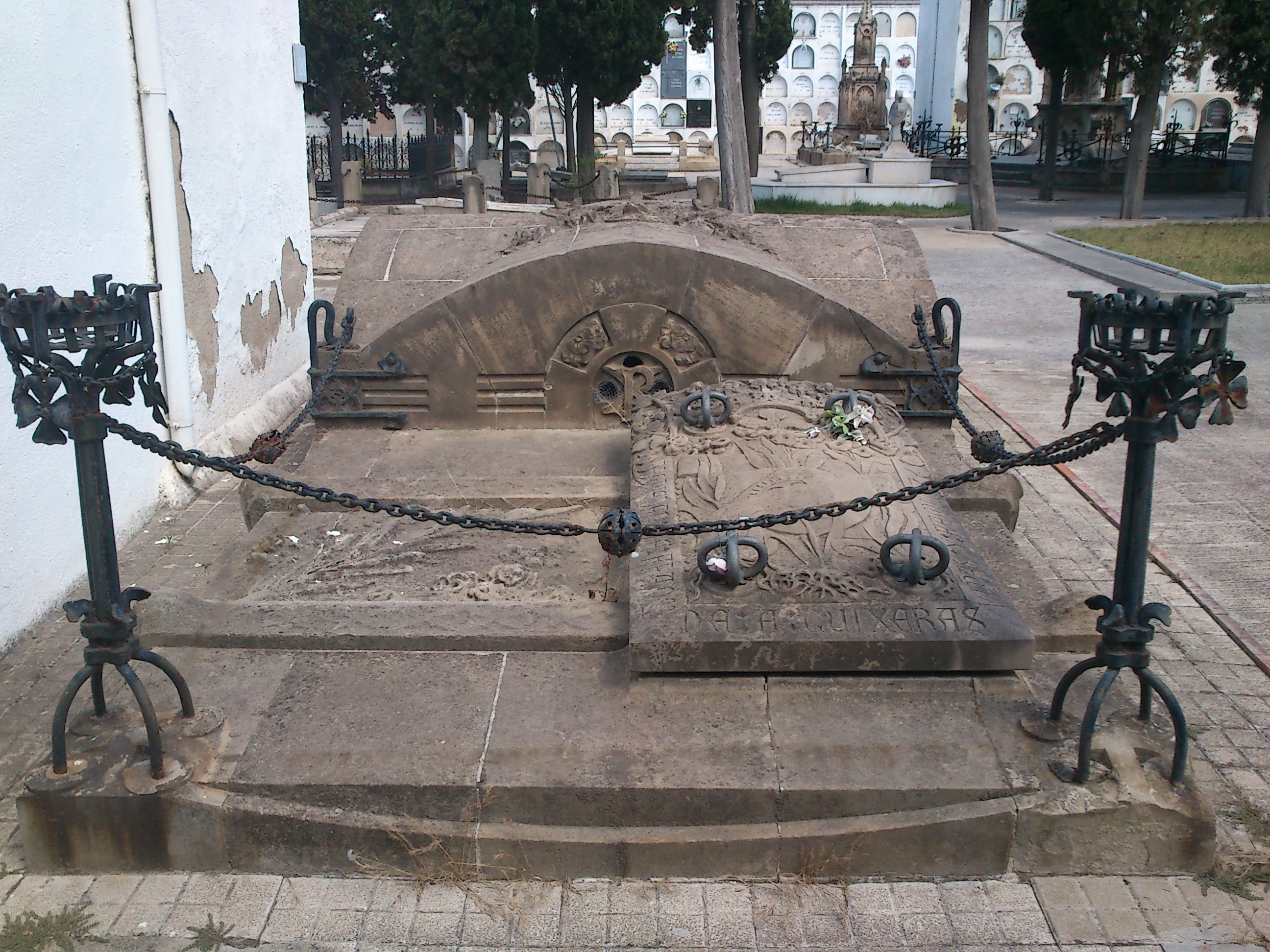 Tomba de l'alcalde Guixeras Viñas i família al Cementiri Vell de Badalona (1904). Obra de Joan Amigó i Barriga, exponent modernista a Badalona.